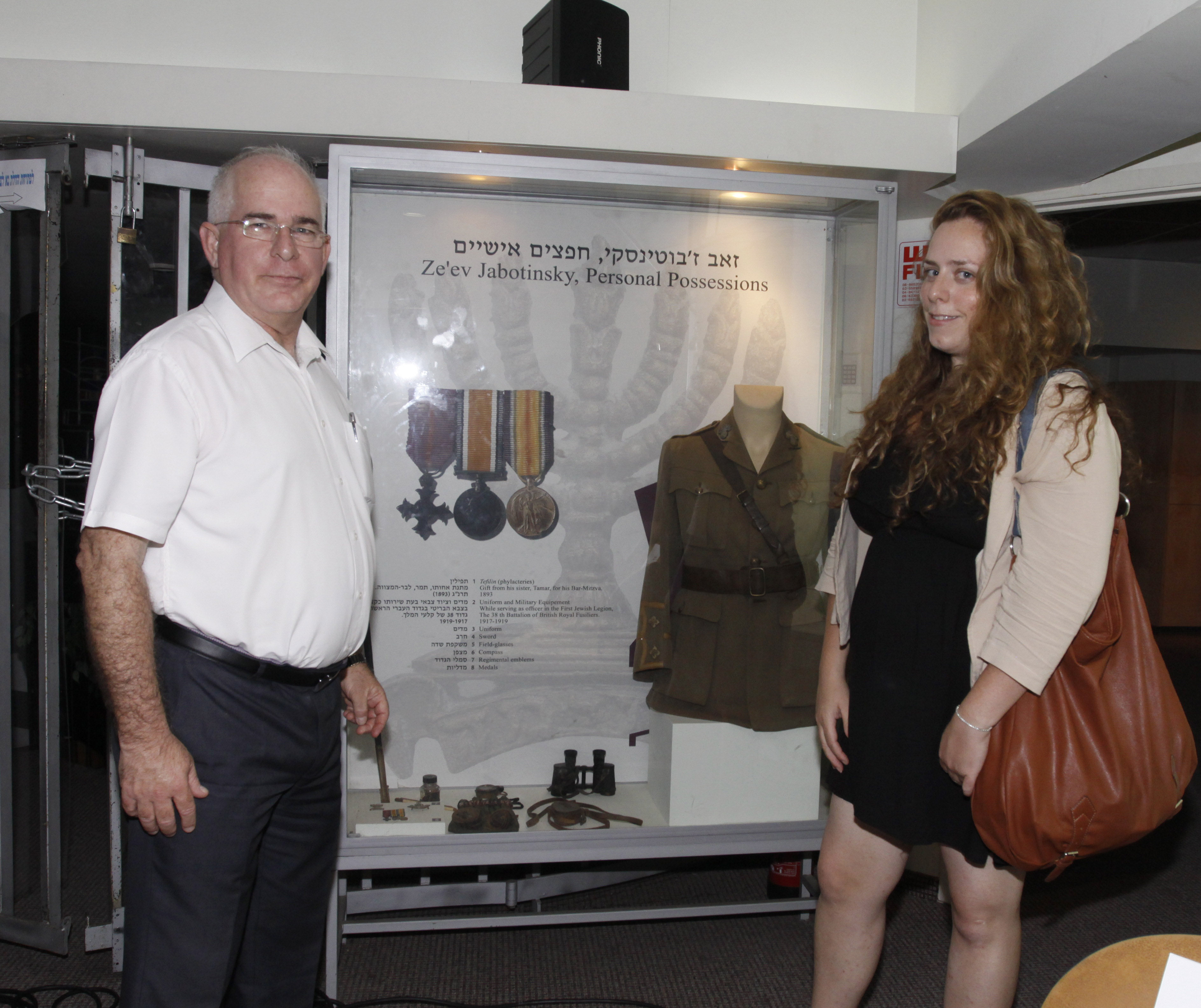 מדים ועיטורים צבאיים של זאב ז'בוטינסקי במוזאון מכון ז'בוטינסקי בתל אביב, ולצדם זאב ז'בוטינסקי הנכד ובתו טל